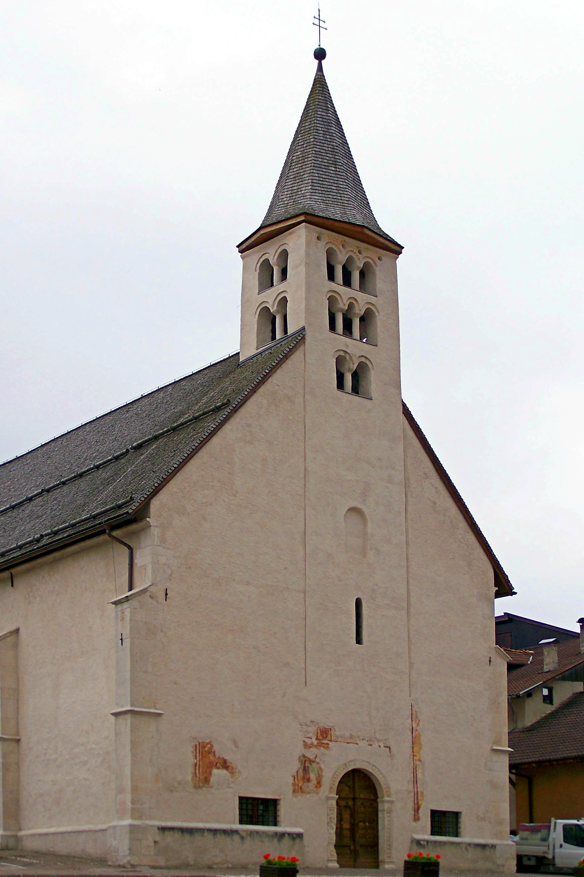 Facciata e campanile della chiesa di Santa Maria in Sarnonico